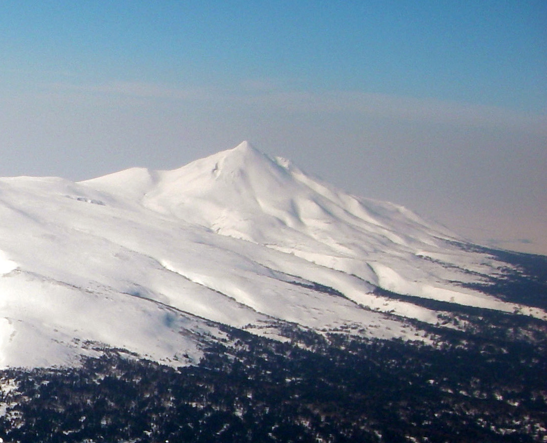 Фотография сделана во время восхождения на вулкан Тятя